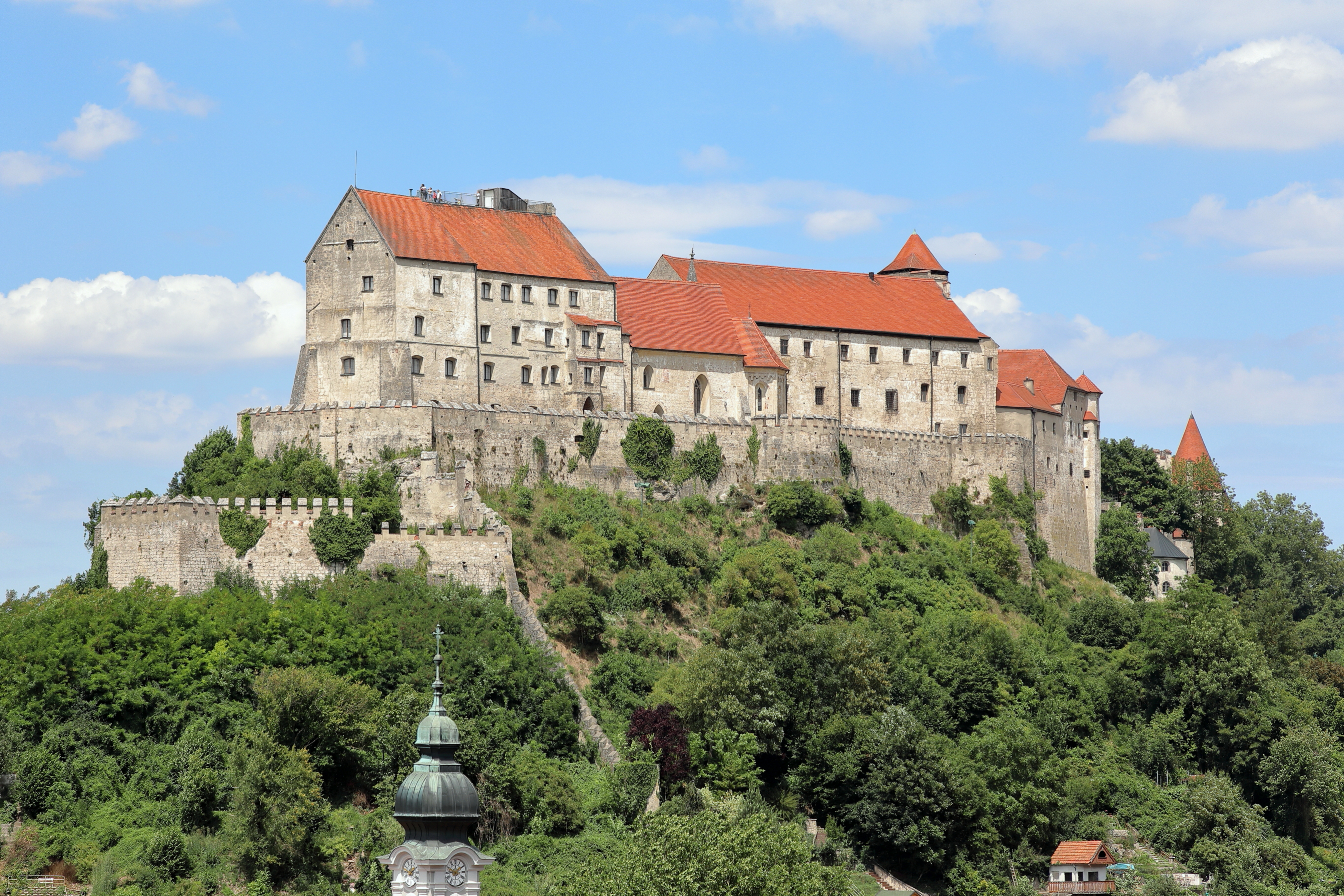 Südansicht der Hauptburg in der deutschen Herzogstadt Burghausen im oberbayerischen Landkreis Altötting.